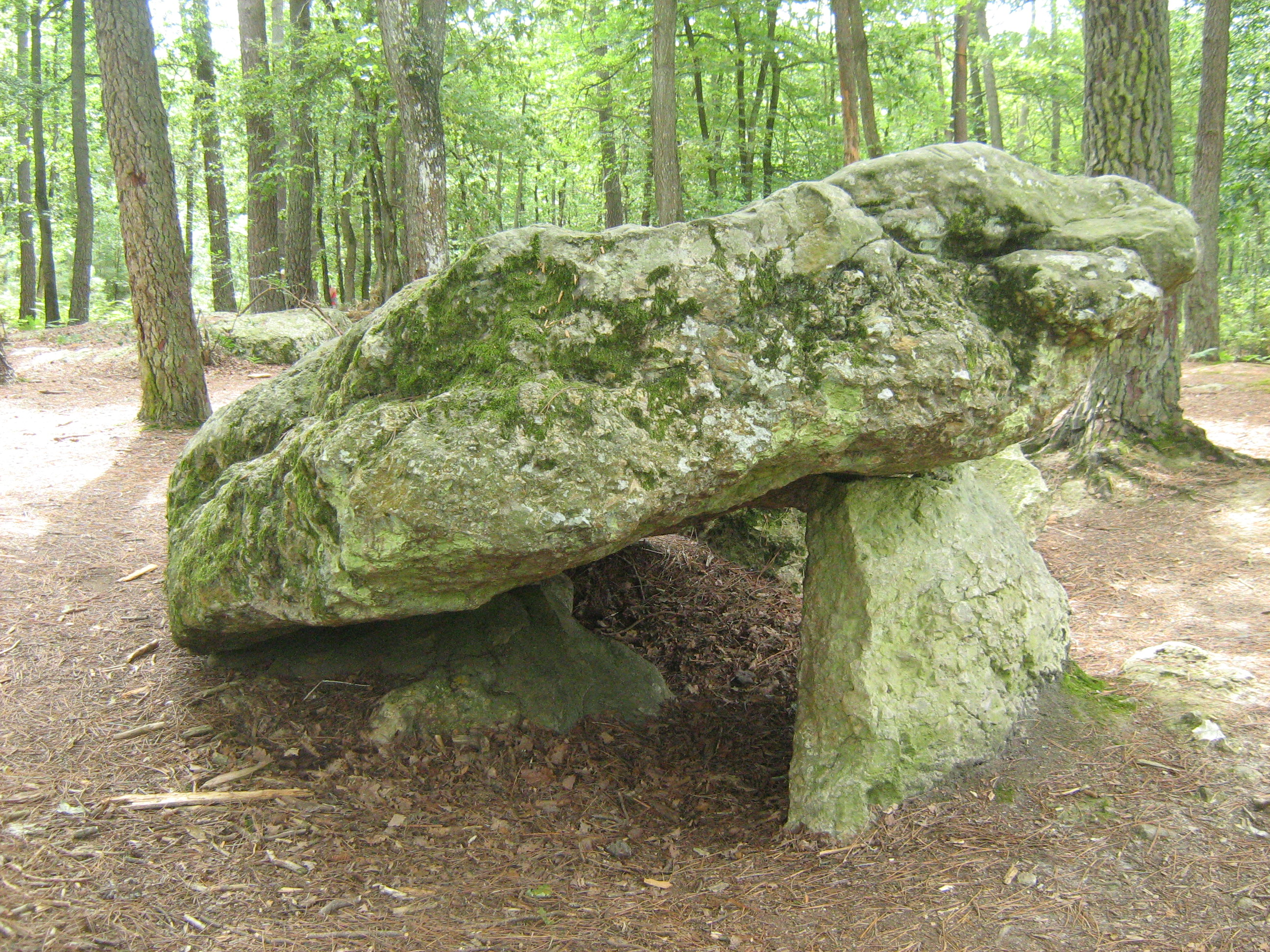 Dolmen de la Pierre Procureuse à Saint-Cyr-la-Rosière, Orne (FRANCE). .